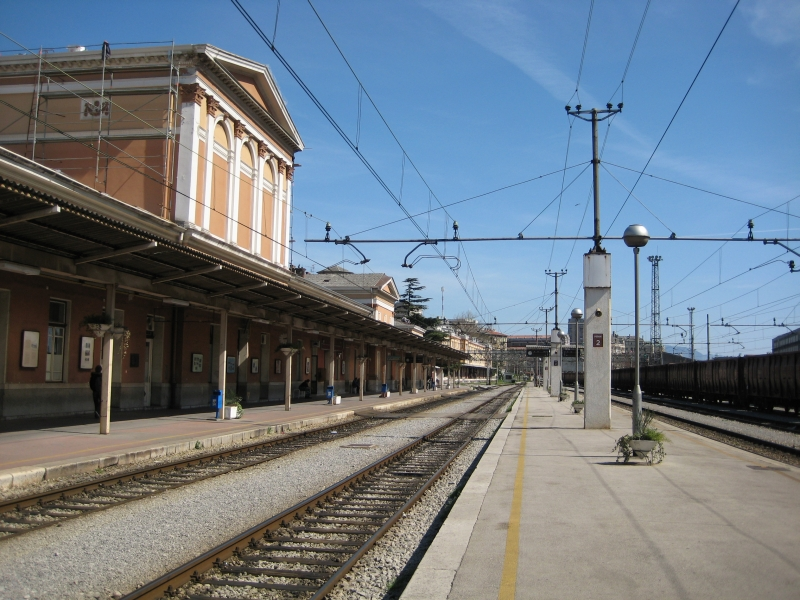 Željeznički kolodvor, Rijeka